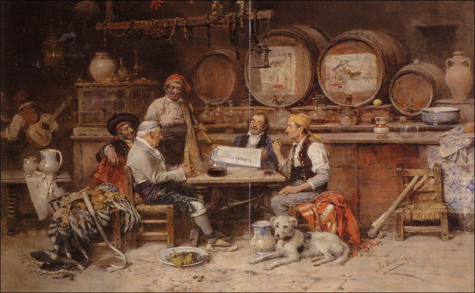 Oleo de José Benlliure Gil: 'La tertulia'. Colección Vicente Fuster.